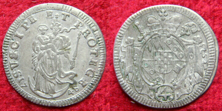 4 Kreuzer von 1748 aus dem Bistum Würzburg - rückseitig mit dem Wappen des Bischofs Anselm Franz von Ingelheim